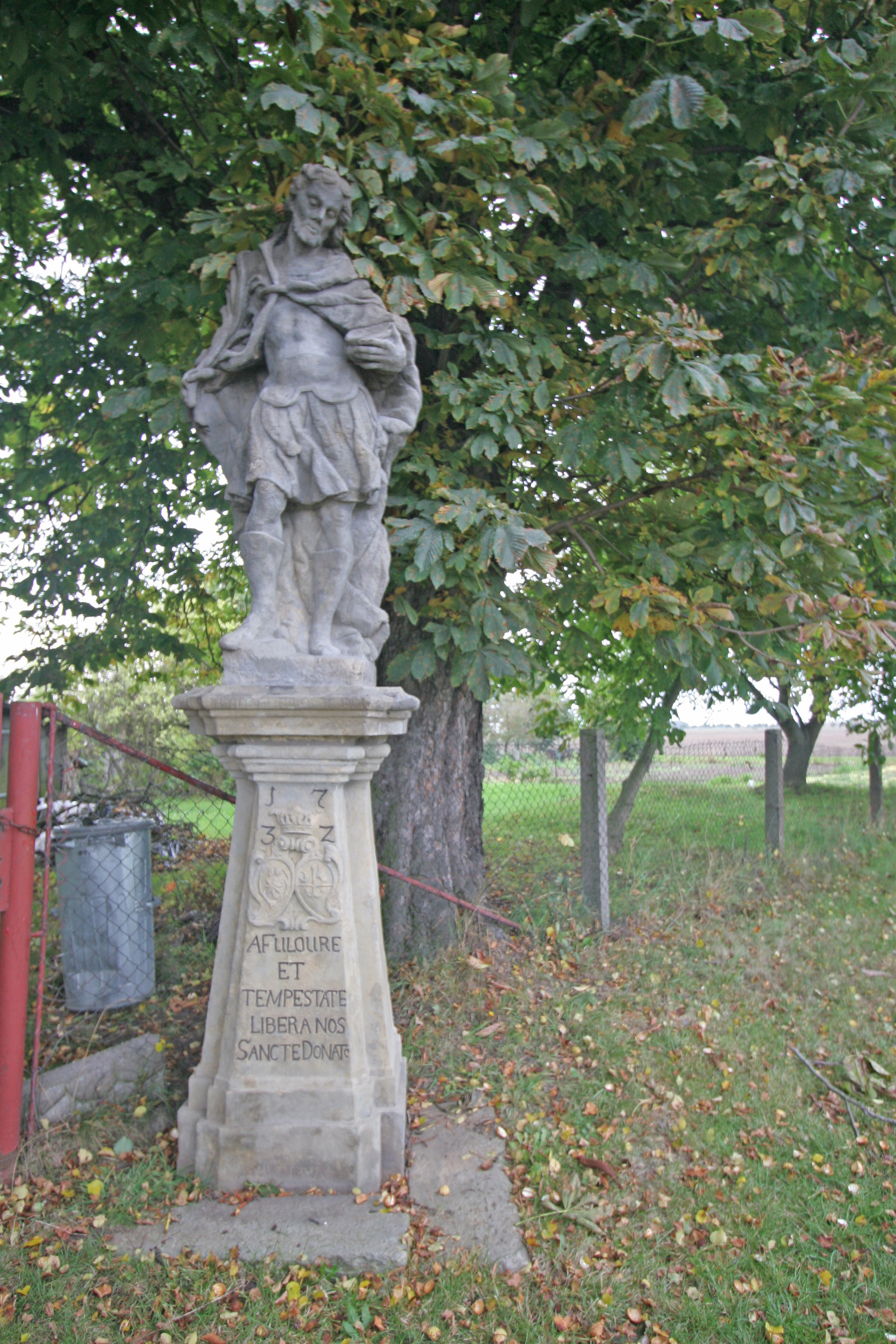 Sloup se sochou sv. Donáta, Stará Skřeneř, při silnici směr Nový Bydžov.